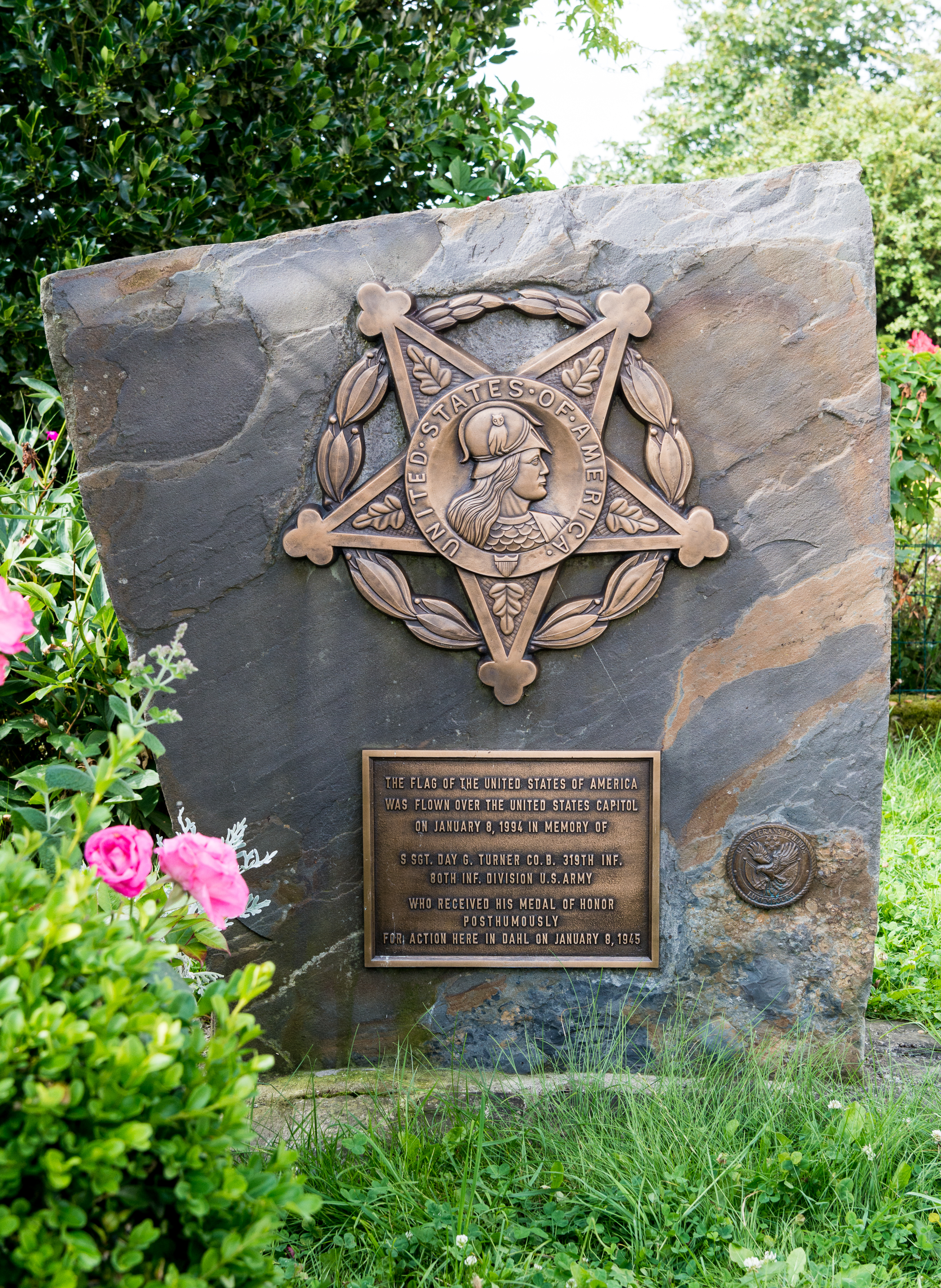 D'Monument um Haff Aastert zu Dol wou de Staff-sergeant Day G. Turner sech den 8. Januar 1945 mat senge Leit verschanzt hat an deen hien erfollegräich géint eng feindlech Iwwermacht verdeedegt huet. Den Turner gouf dowienst posthum mat der héichster US-amerikanescher Arméiauszeechung, der Medal of Honor dekoréiert. Den 8. Februar 1945 ass hien zu Wallenborn gefall. Hie gouf um Amerikaneschen Zaldotekierfecht zu Hamm begruewen. Méi iwwer den Turner hei. Och de Joseph Maertz huet a sengem Wierk Luxemburg in der Rundstedt-Offensive: das Duell Patton - von Rundstedt in den Oeslinger Bergen de Virfall beschriwwen.